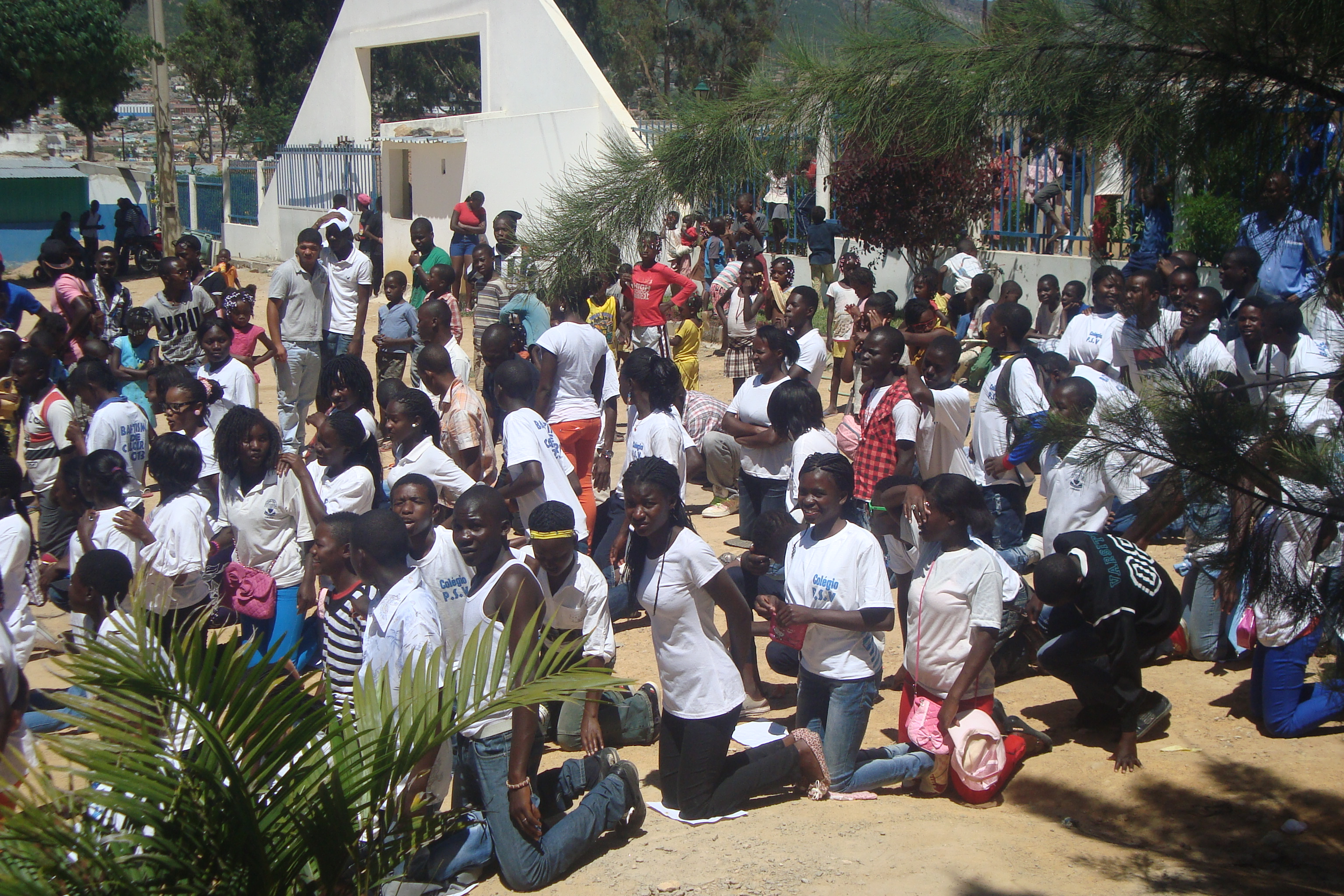 angola o pais de estudo